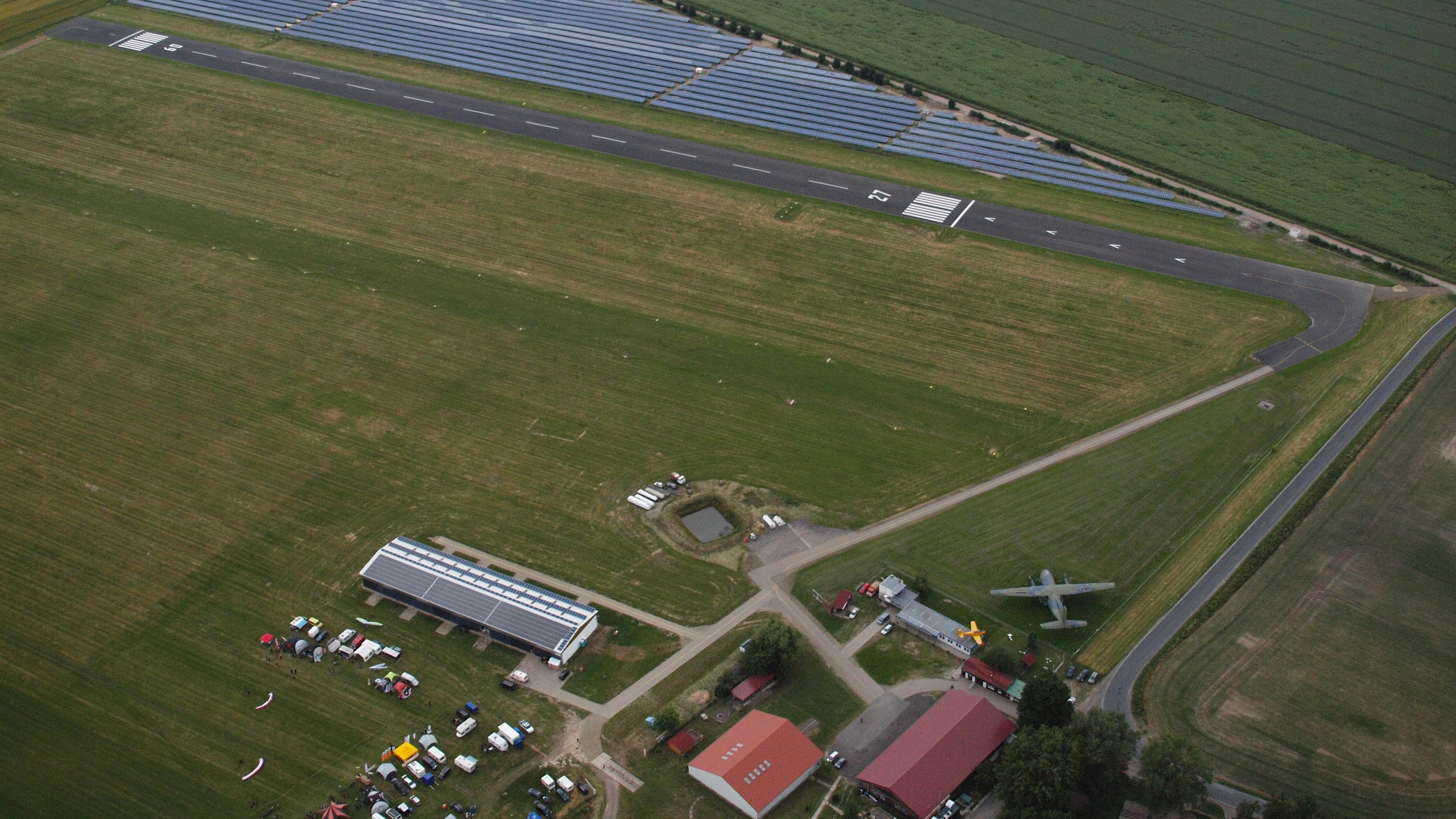 Verkehrslandeplatz Ballenstedt bei Quedlinburg: Luftaufnahme